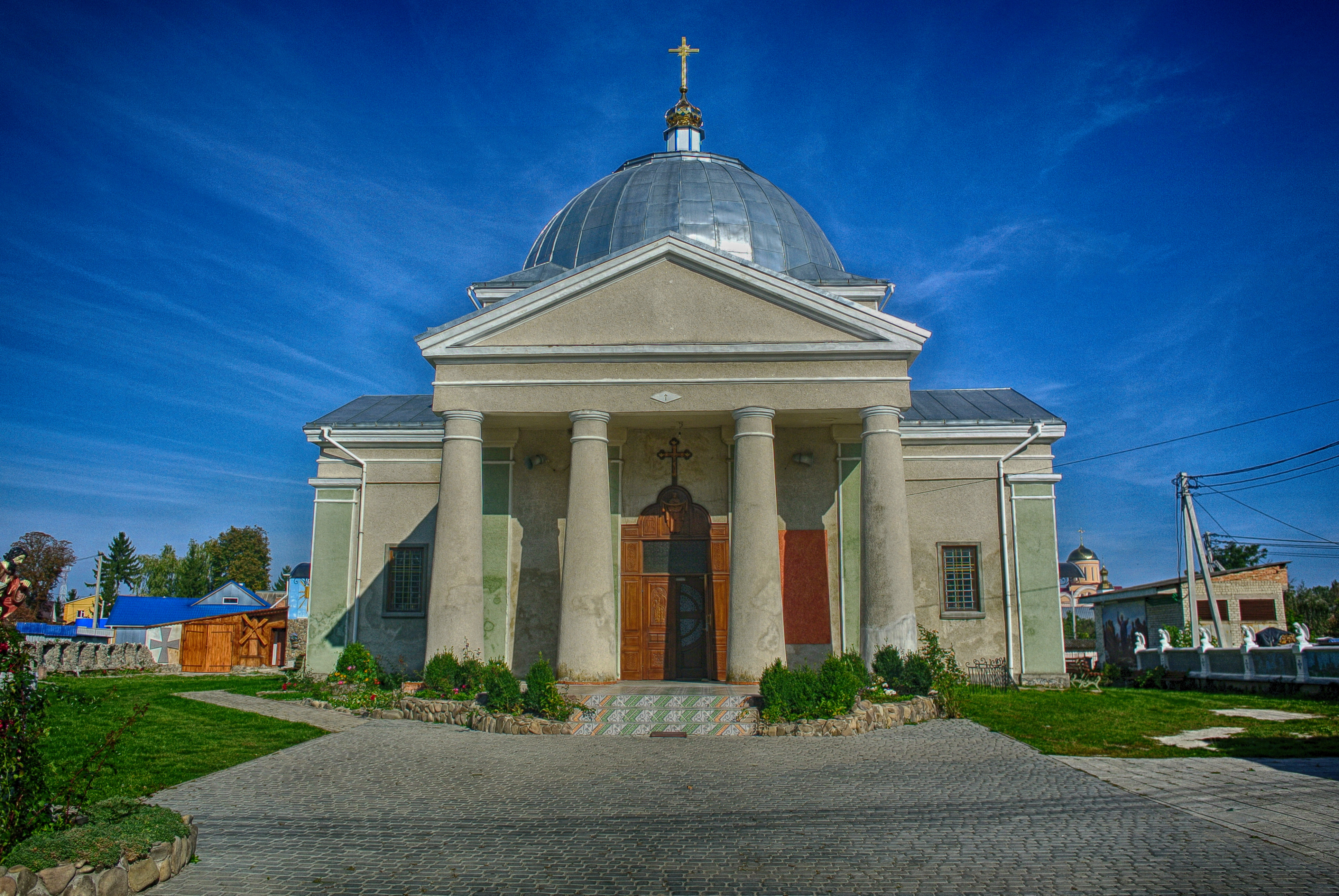 Покровська церква (мур.), Млинів, вул.Кірова